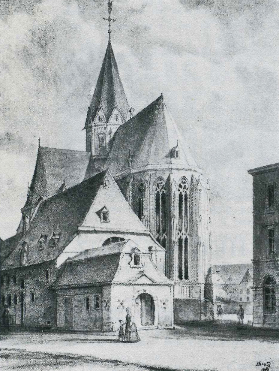 Heriberthospital vor St. Andreas um 1840, Köln